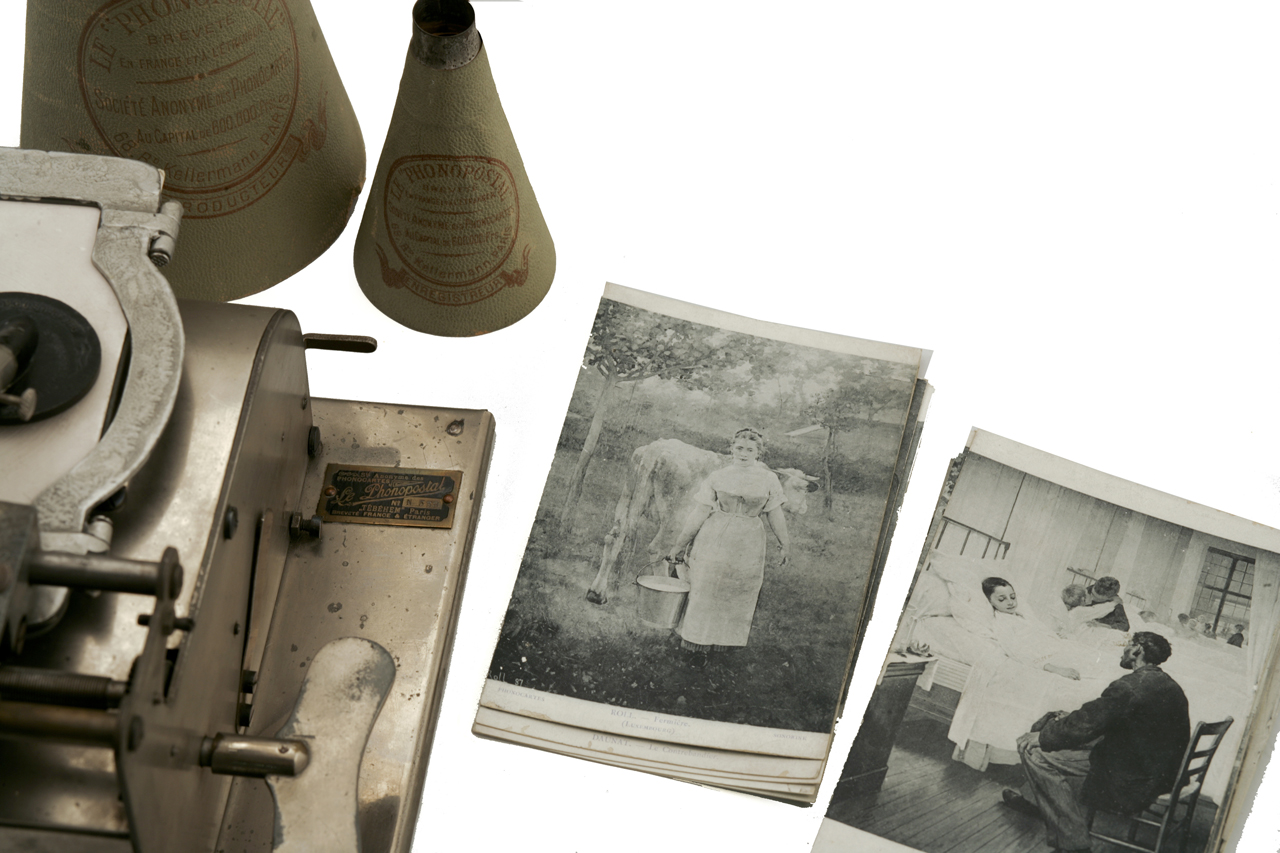 Apparecchio costituito da un corpo in metallo cromato, poggiante su una base rettangolare, anch'essa in metallo. La macchina è azionata da un motore a molla, sistemato all'interno di una copertura in lamiera; sul fianco destro della copertura si trova la chiave per il caricamento del motore. Il motore mette in rotazione un intelaiatura apribile, nella quale è da sistemare la fonocartolina da incidere o riprodurre. Al di sopra dell'intelaiatura è collocato il supporto per la puntina, il cui sollevamento e abbassamento sono comandati da una leva vicina al supporto. Sul lato posteriore è situata un'altra leva per l'avvio e l'arresto della rotazione del telaio. L'apparecchio è provvisto di due imbuti in cartone verde di dimensioni differenti per l'incisione e la riproduzione; in una scatoletta in cartone verde inoltre è conservata la testina per la riproduzione. La macchina è accessoriata con ventisette fonocartoline. Funzione Registrazione di suoni su fonocartolina e loro riproduzione Modalità d'uso Per incidere il messaggio, inserire una fonocartolina nell'apposita intelaiatura e caricare il motore a molla; registrare il messaggio utilizzando il cono ricevitore. Per riascoltare il messaggio, sostituire il cono ricevitore con l'imbuto per l'amplificazione. Notizie storico-critiche Il Phonopostal, introdotto sul mercato nel 1905, era un apparecchio ideato per l'incisione e la riproduzione di fonocartoline. Le fonocartoline avevano lo stessa formato delle cartoline postali, con il lato anteriore figurato e il lato posteriore trattato con una sostanza simile alla cera fonografica. Una volta incisa, la cartolina poteva essere affrancata e spedita per posta. L'ascolto del messaggio era possibile utilizzando un apparecchio dello stesso tipo.